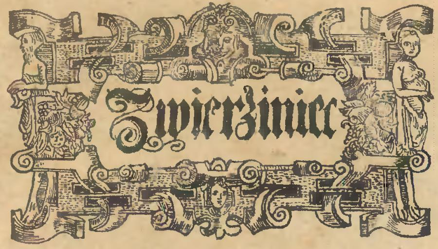 Mikołaj Rej, "Zwierzyniec". Fragment karty tytułowej z wydania z 1574 roku z ornamentem kartuszowo-zawijanym (tzw. rollwerkiem), Biblioteka Jagiellońska